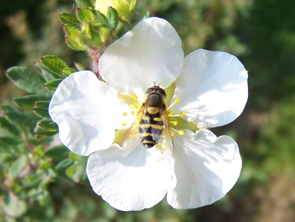 Description